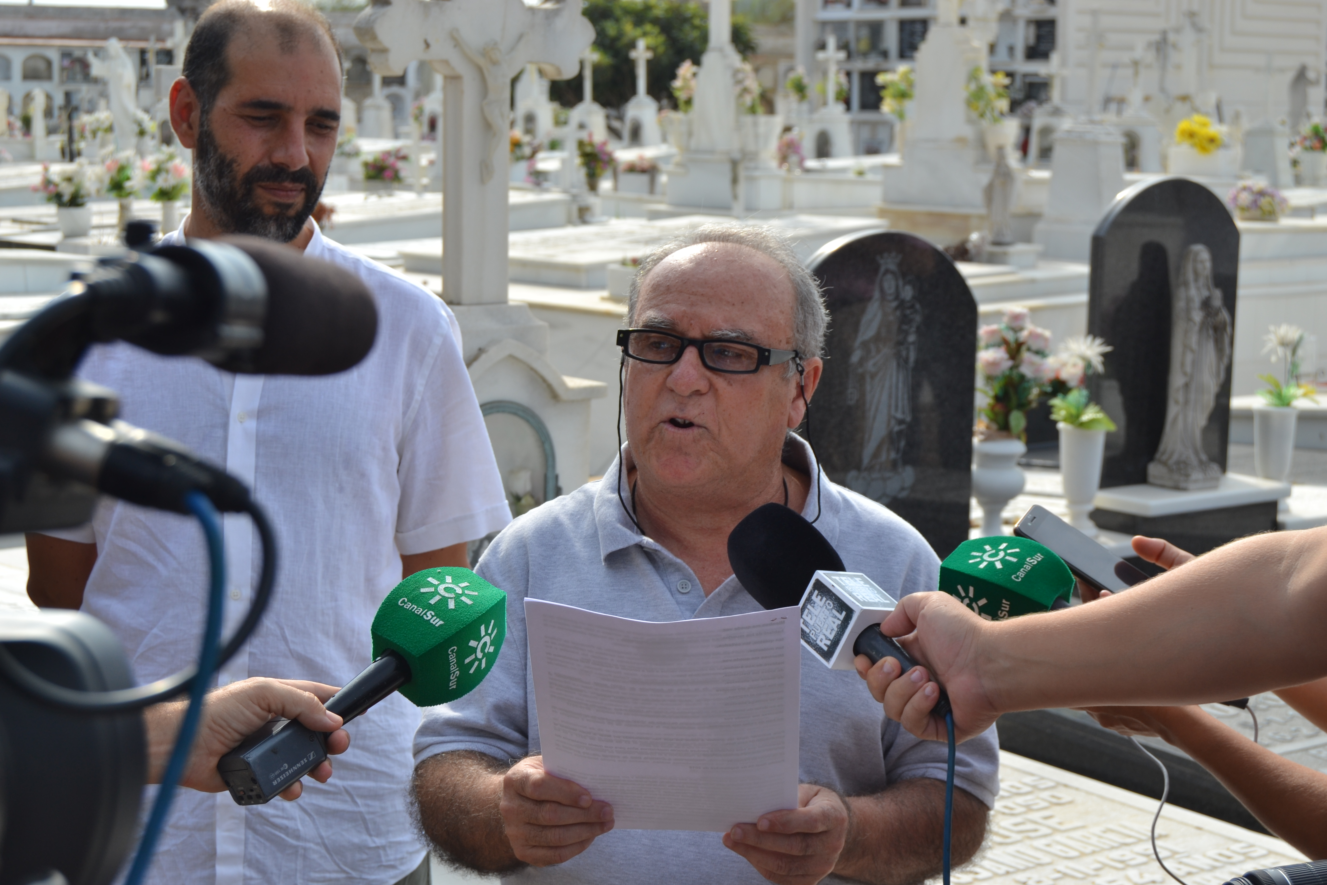 Puerto Real, Andalucía, España. Septiembre de 2018.